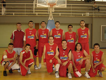 Plantilla DMD Castilleja Baloncesto Senior 2006/2007